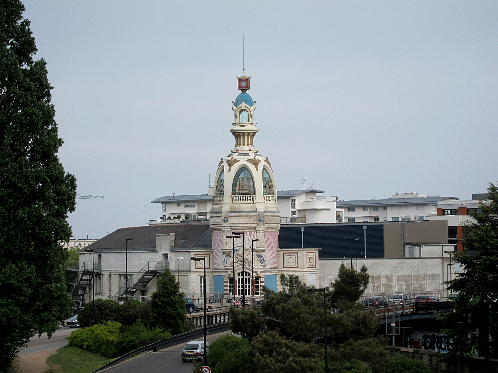 La tour du Lieu Unique à Nantes.